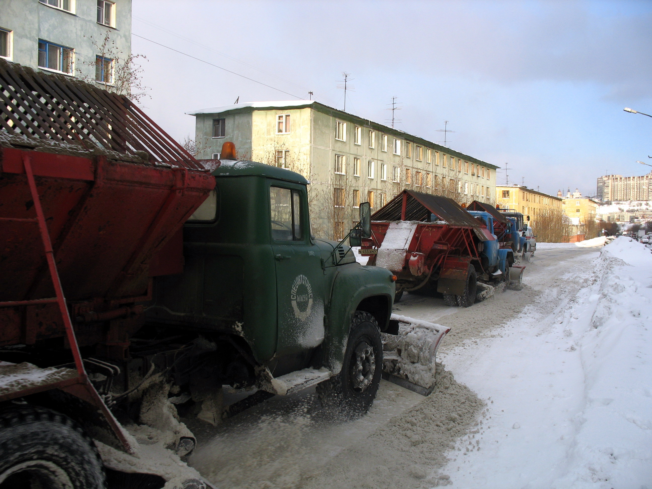 Уборка дороги на ул. Папанина